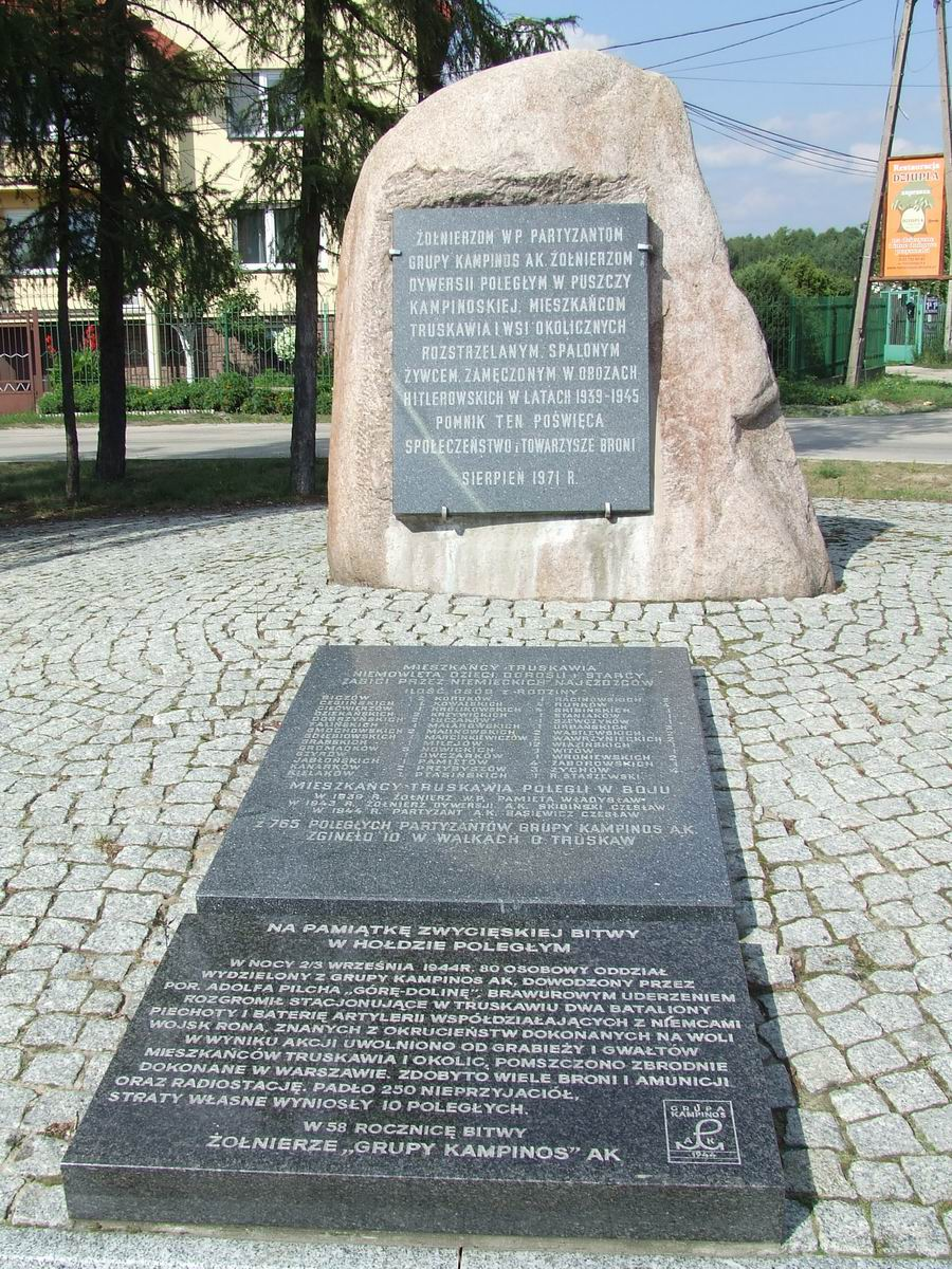 Pomnik w Truskawiu gmina Izabelin